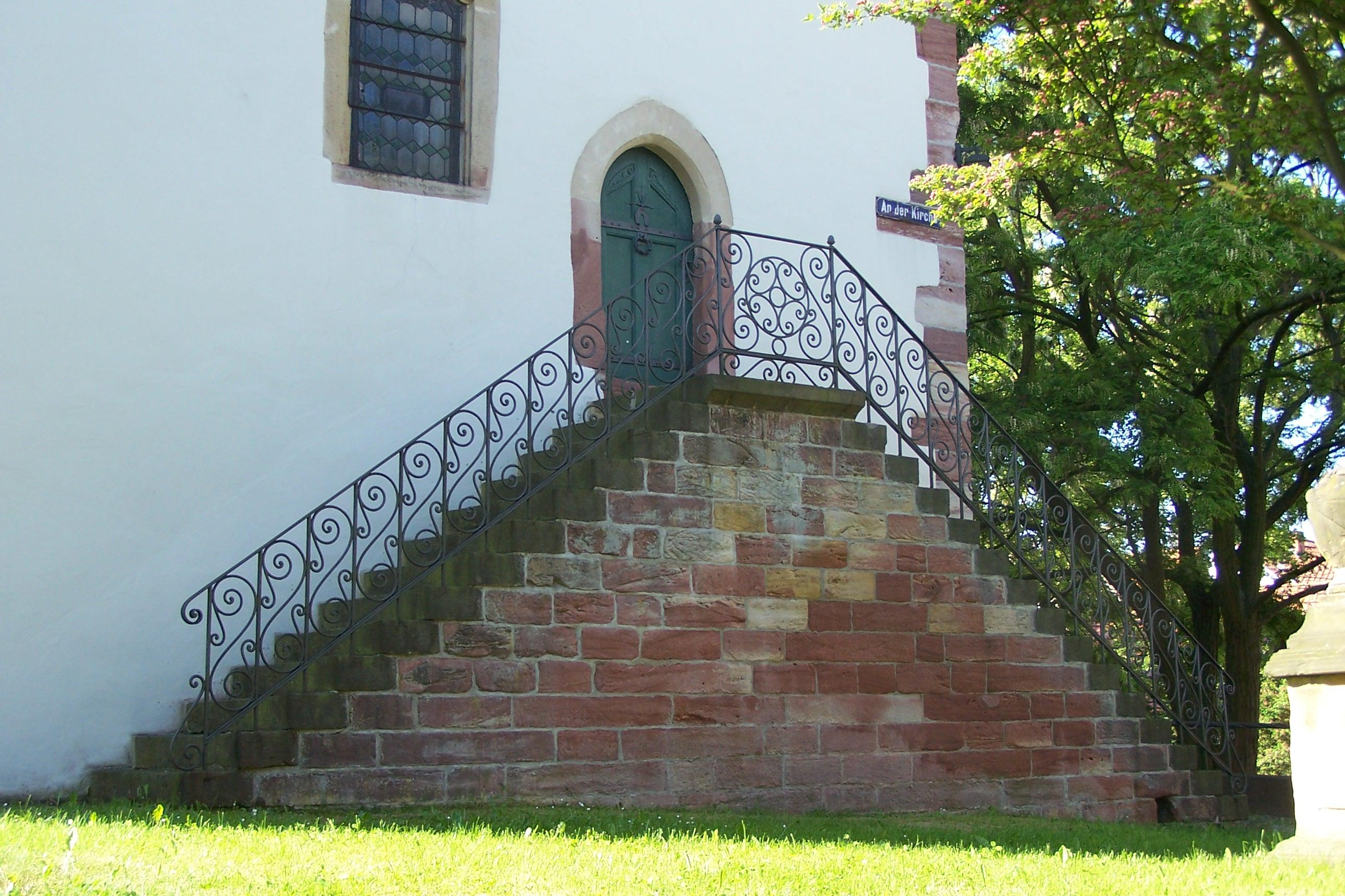 Die Freitreppe auf der Nordseite der Kirche.